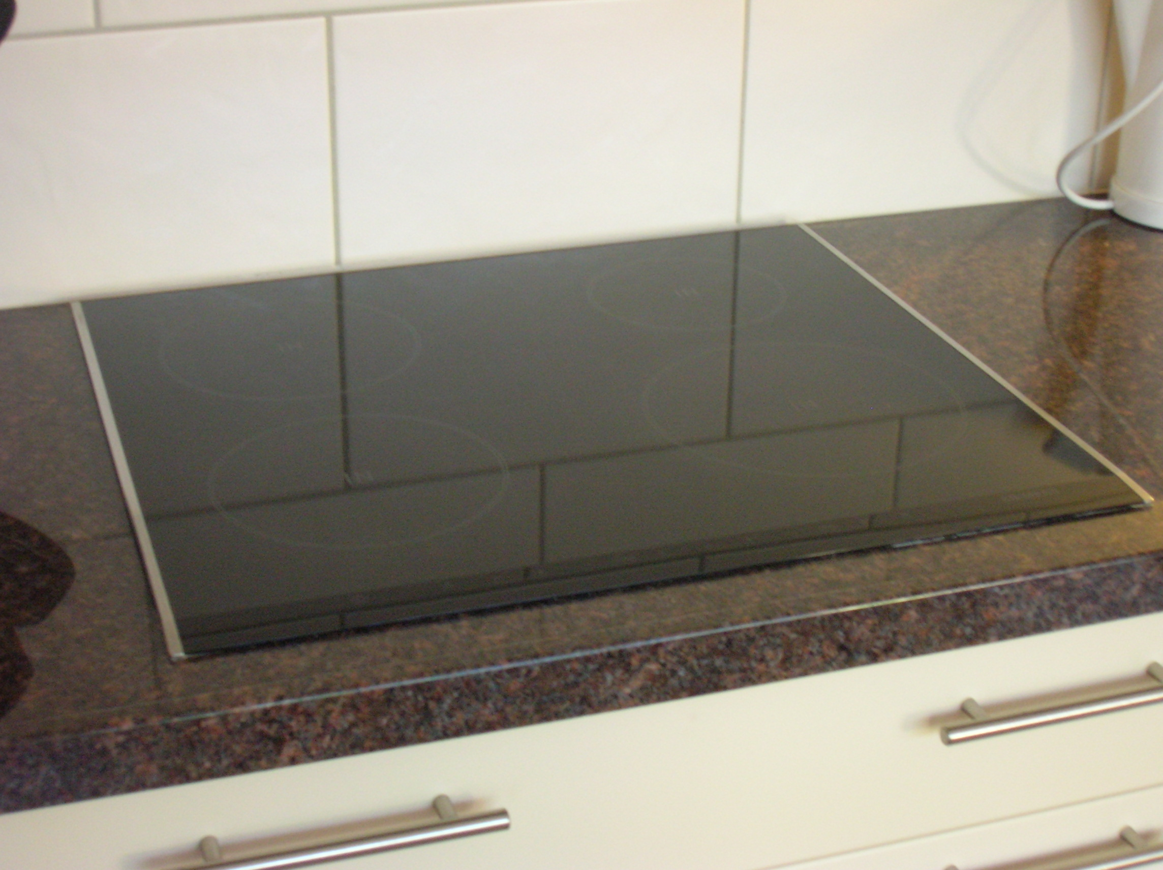 Zelfgemaakte foto, 11 juli 2006: een moderne inductie-kookplaat.